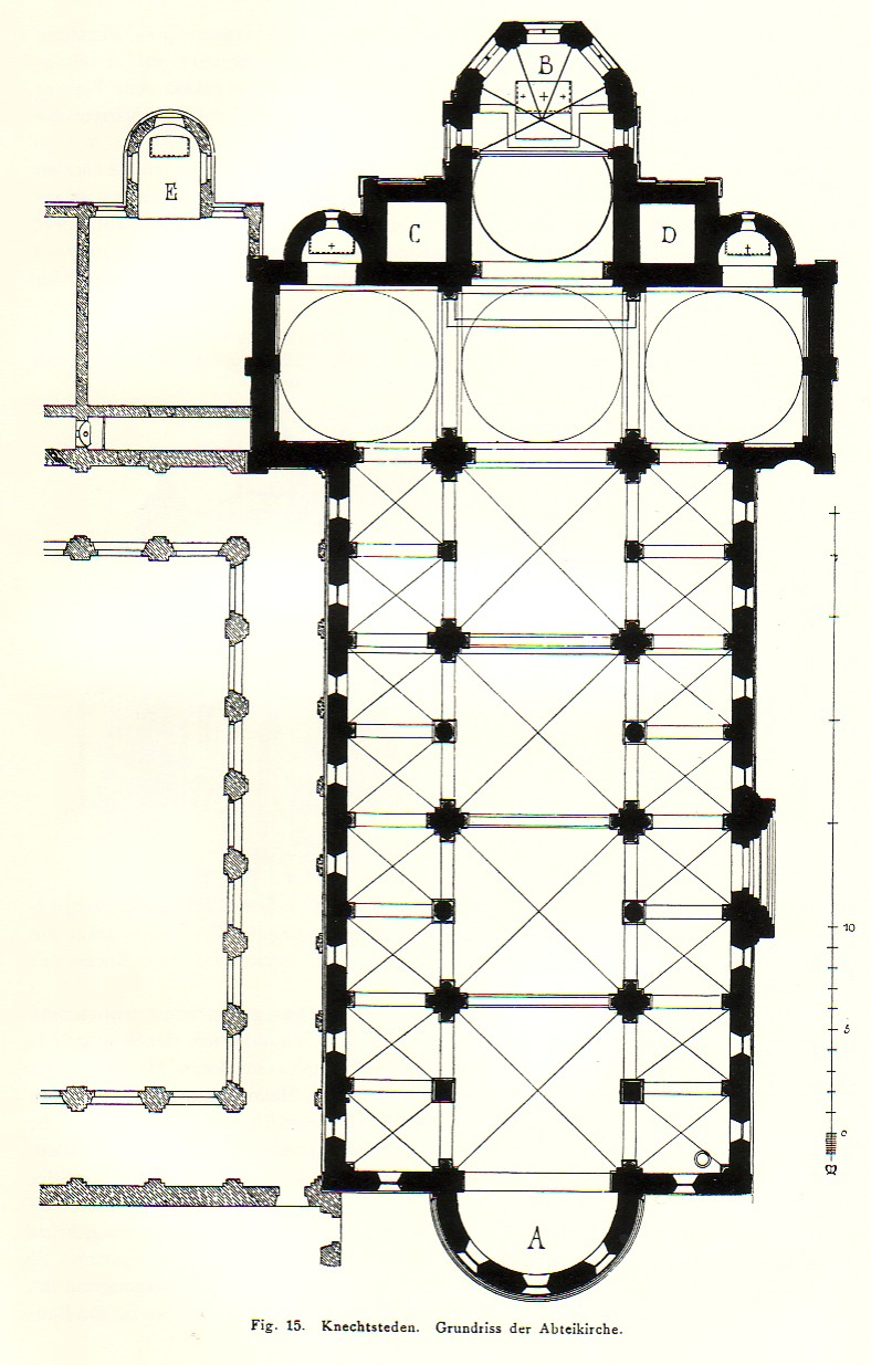 Knechtsteden, Rhein-Kreis Neuss